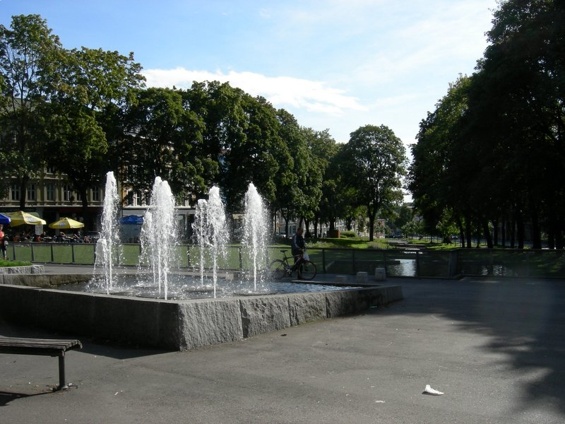 Alexander Kiellands plass sett fra nord ved Waldemar Thranes gate med fontenen.